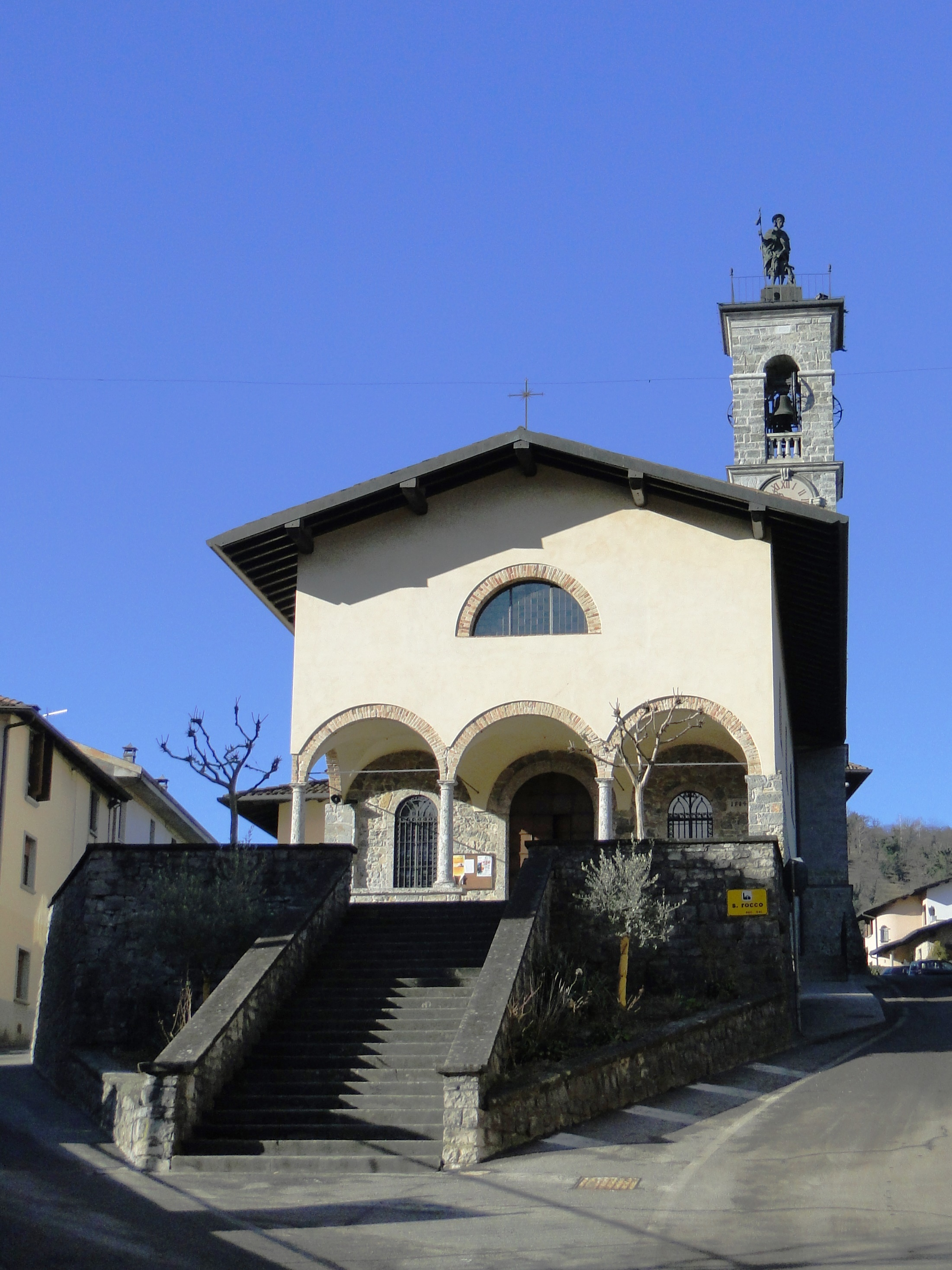 Chiesa di san Rocco. Leffe (BG). Italy